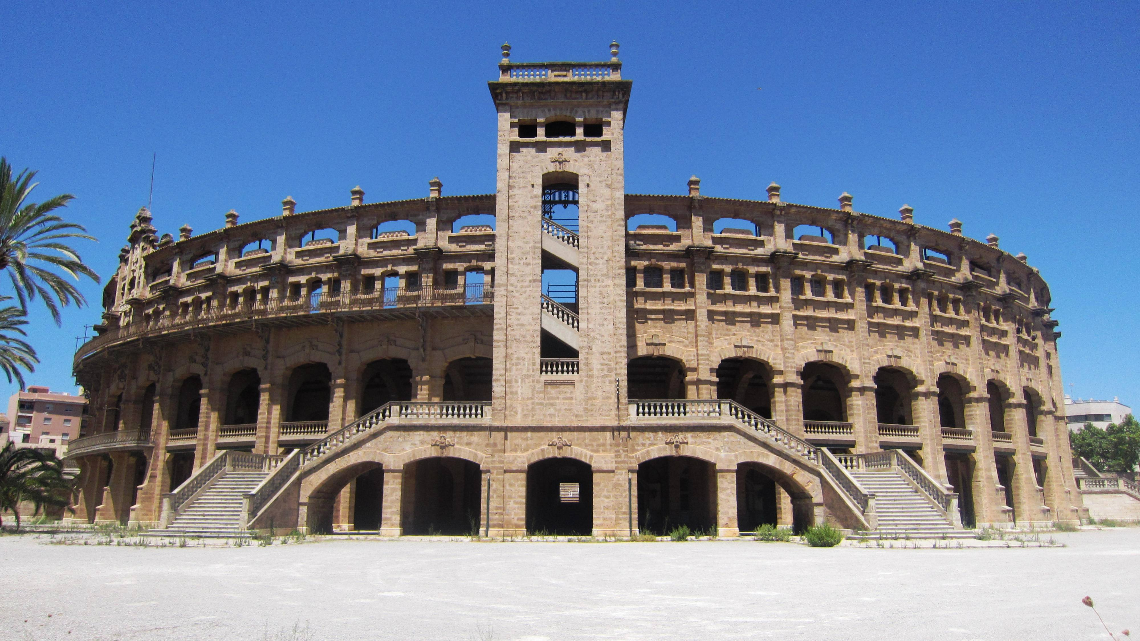 Plaça de toros oder auch Colisseu Balear (Stierkampfarena von Palma)